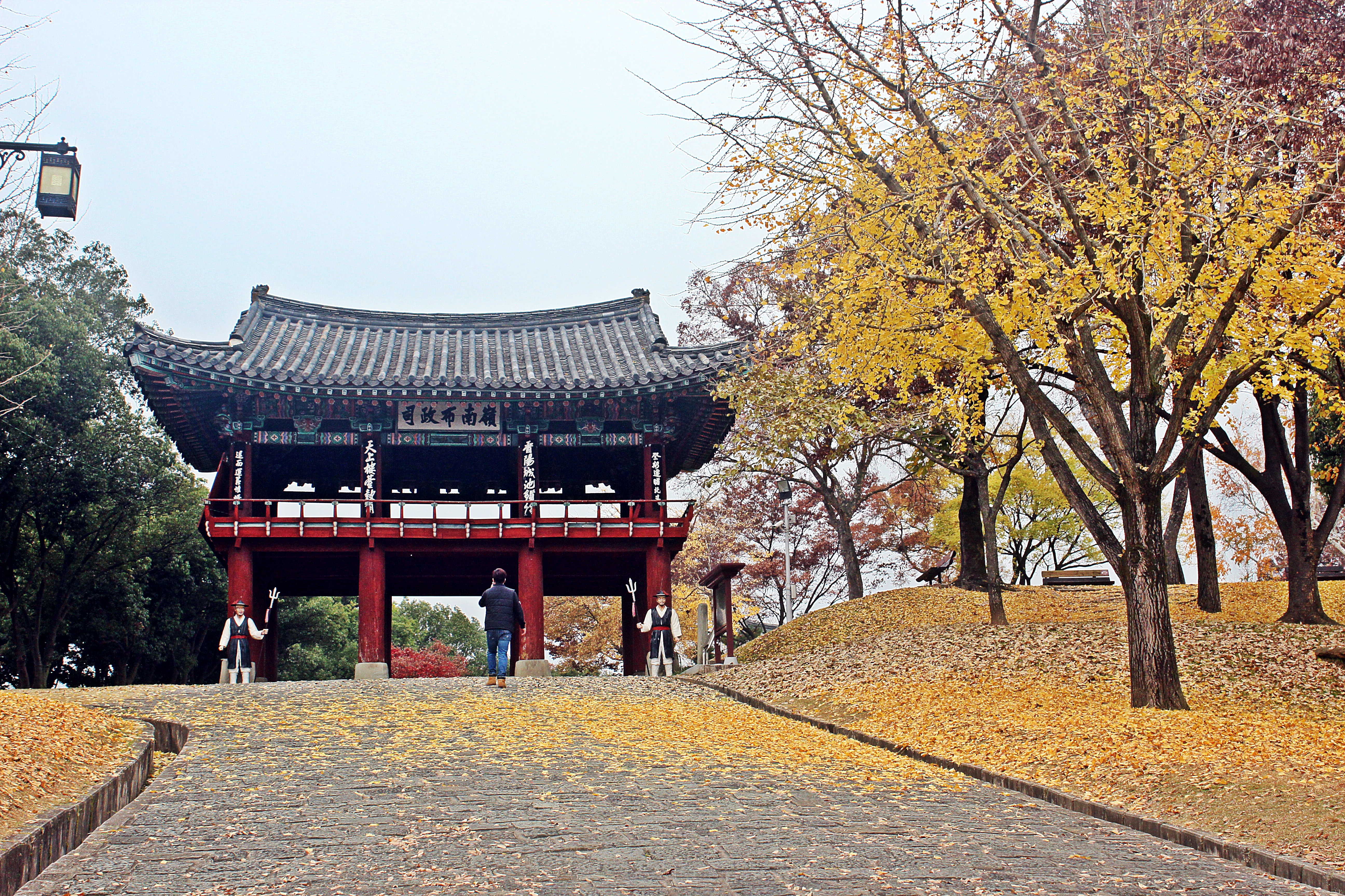 조선시대 경상남도관찰사가 업무를 처리하던 영남포정사의 정문